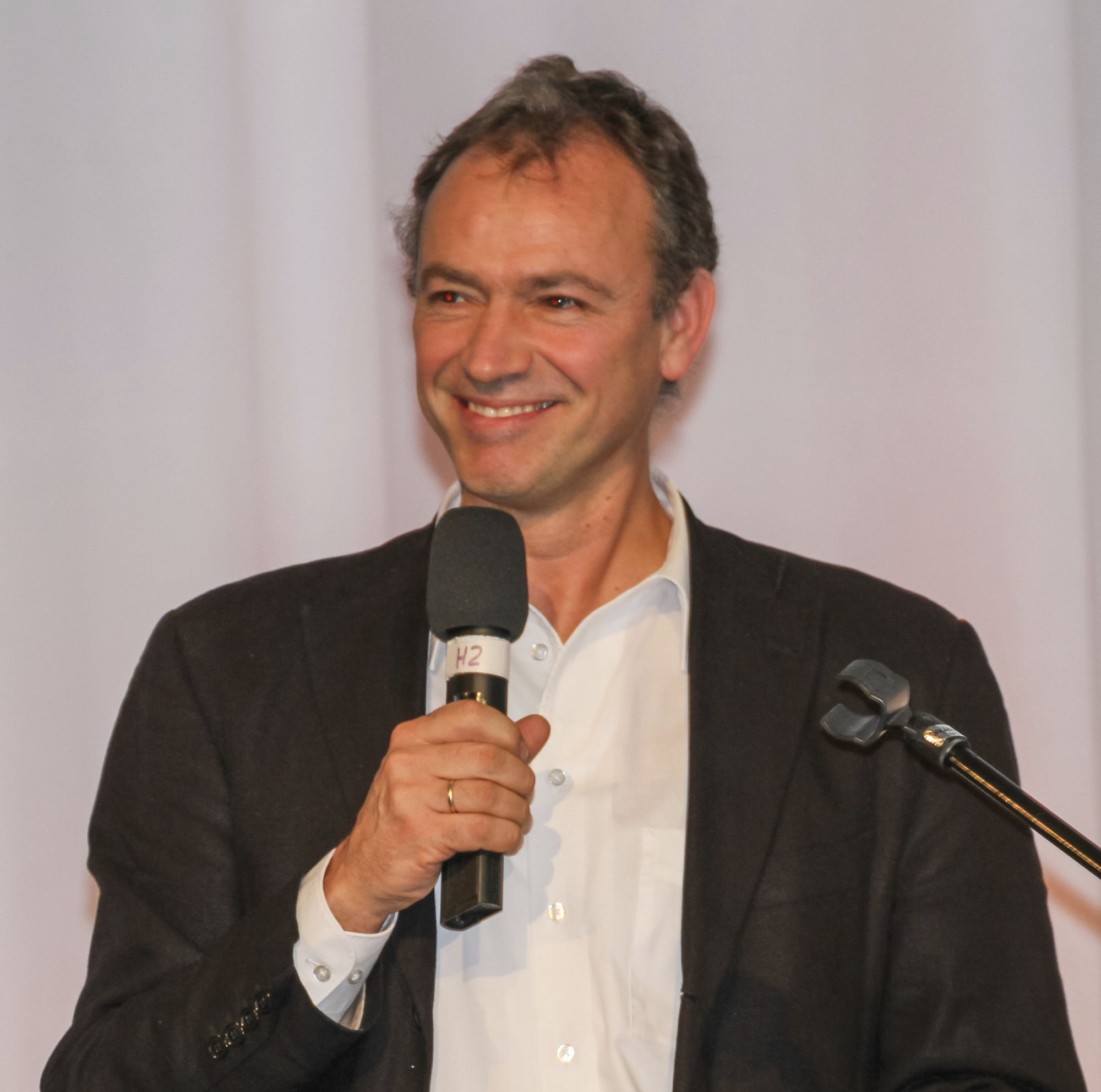 Portrait von Ulrich Neuenhausen